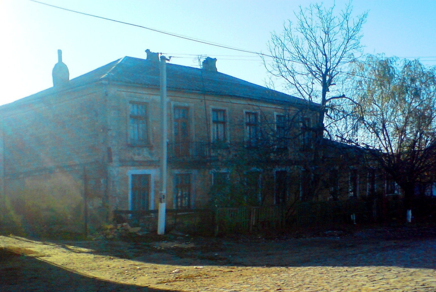 фото здания в Затишье